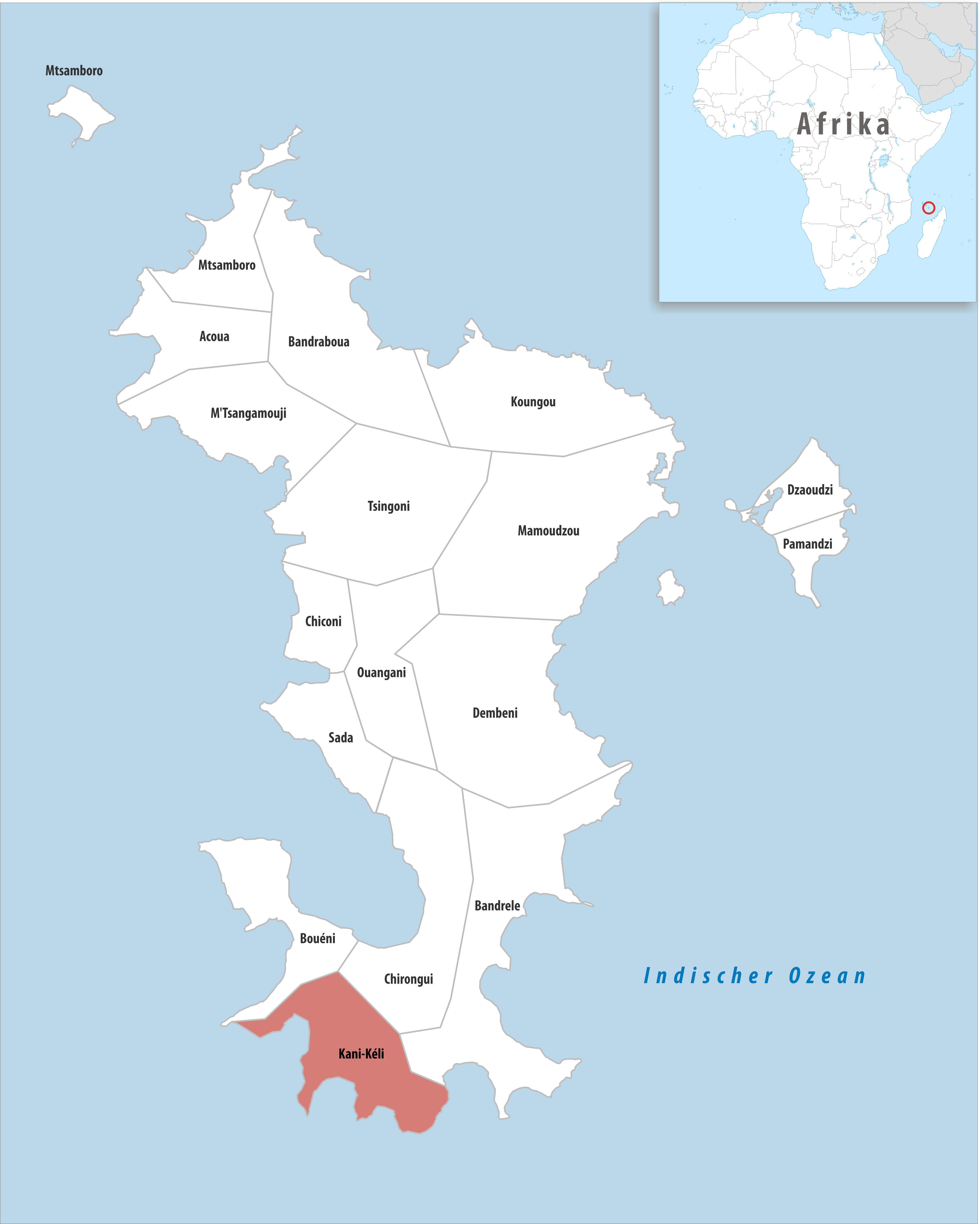 Lage der Gemeinde Kani-Kéli